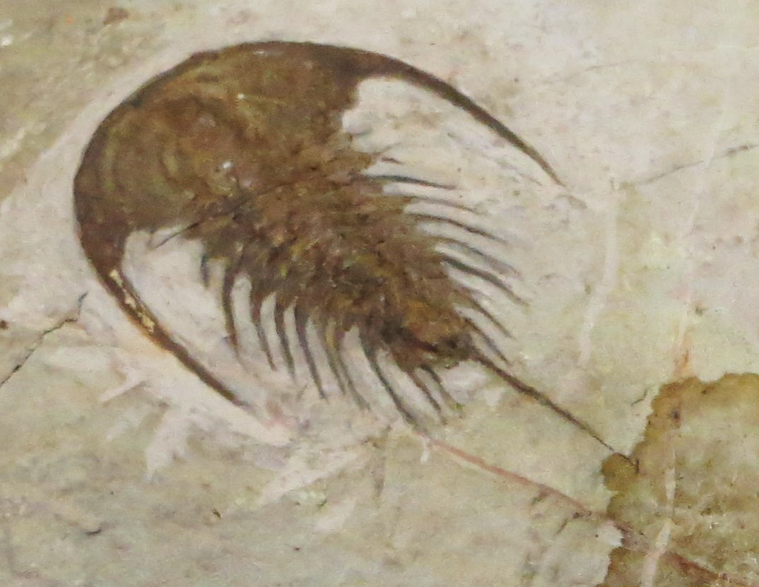 Fossil of Zacanthoides, an extinct trilobite- Took the picture at Museo di Arsago Seprio